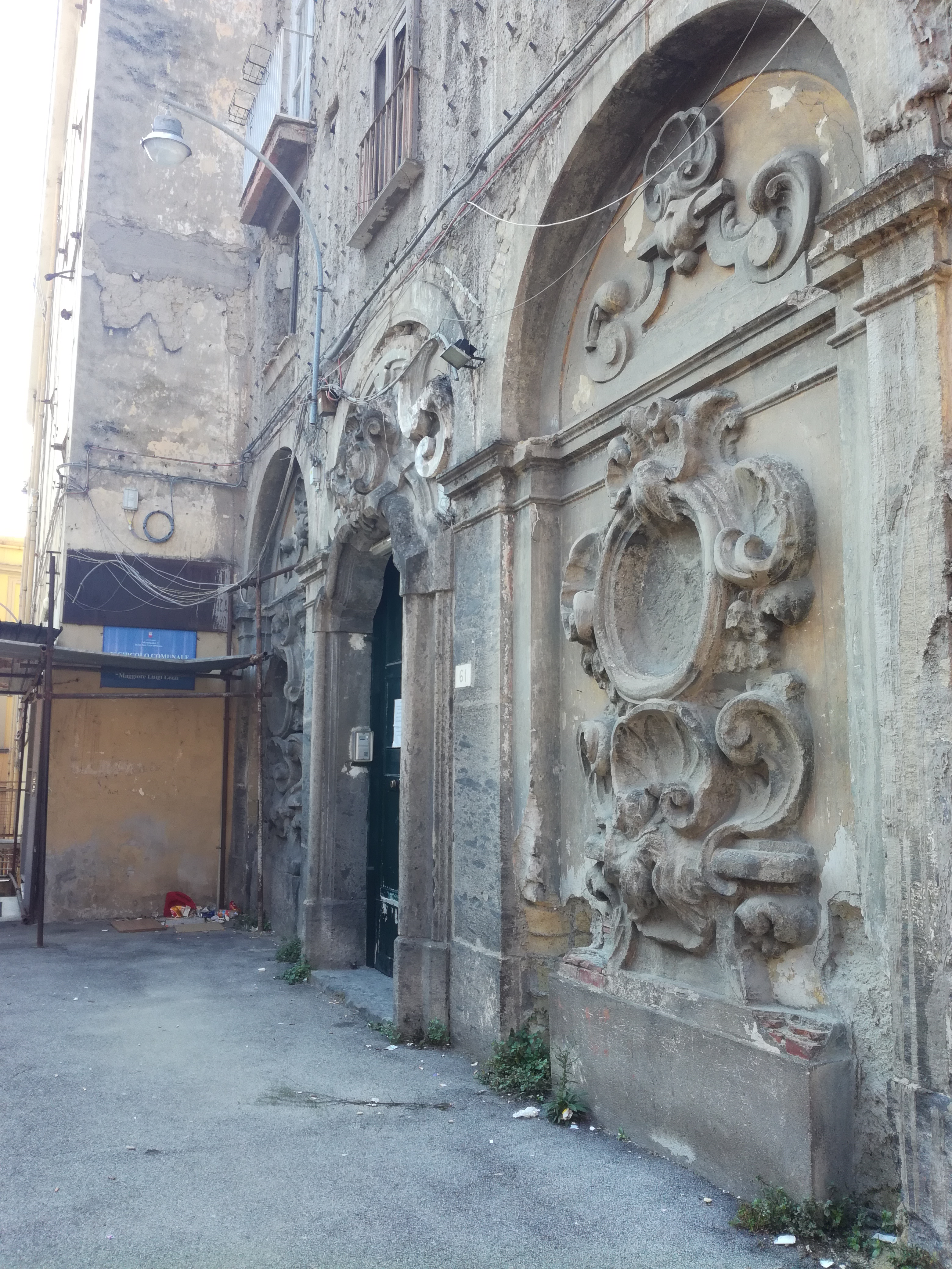 Convento S.Maria della Verità